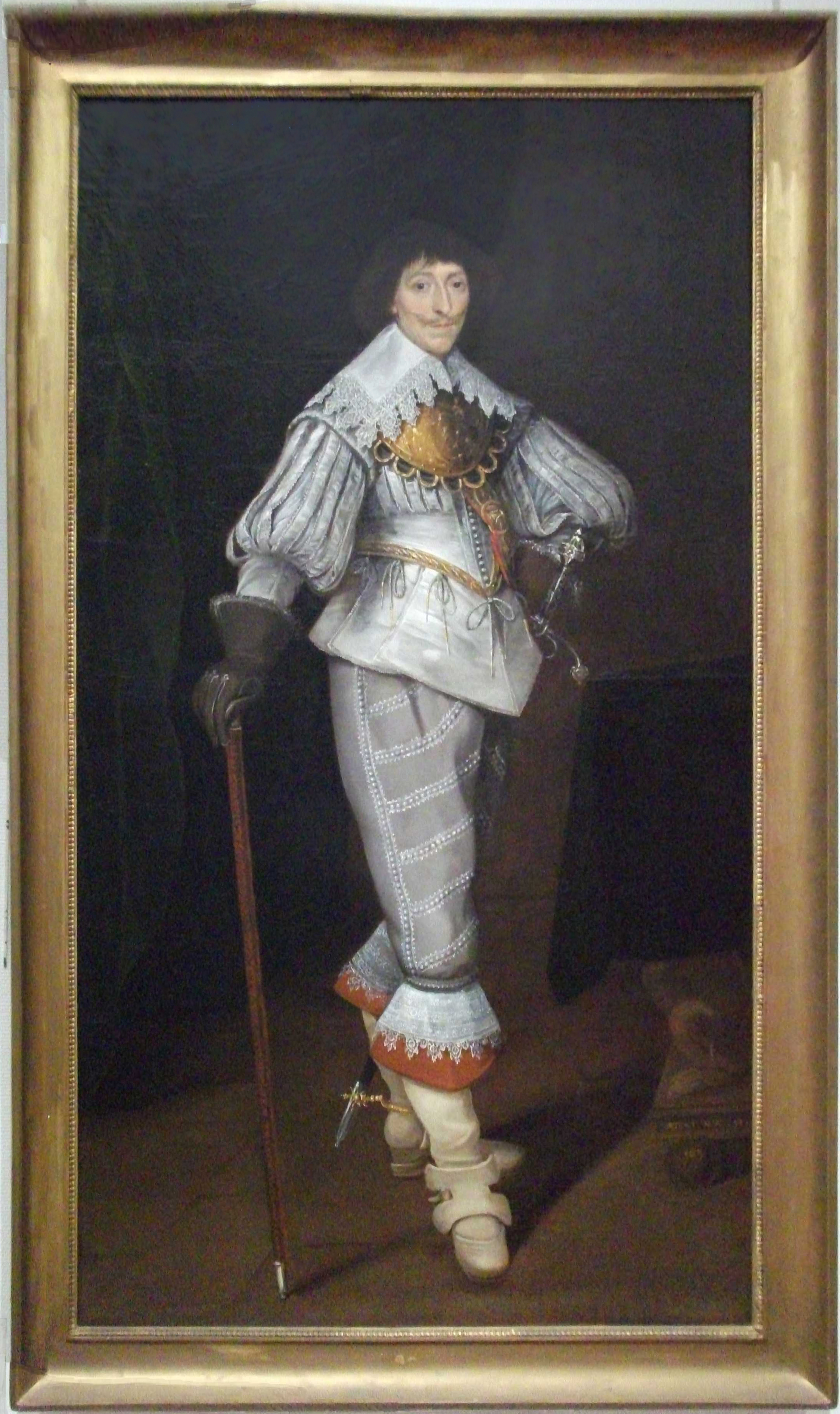 Henri de Lorraine-Chaligny (1596-1672), marquis de Mouy et comte de Chaligny.